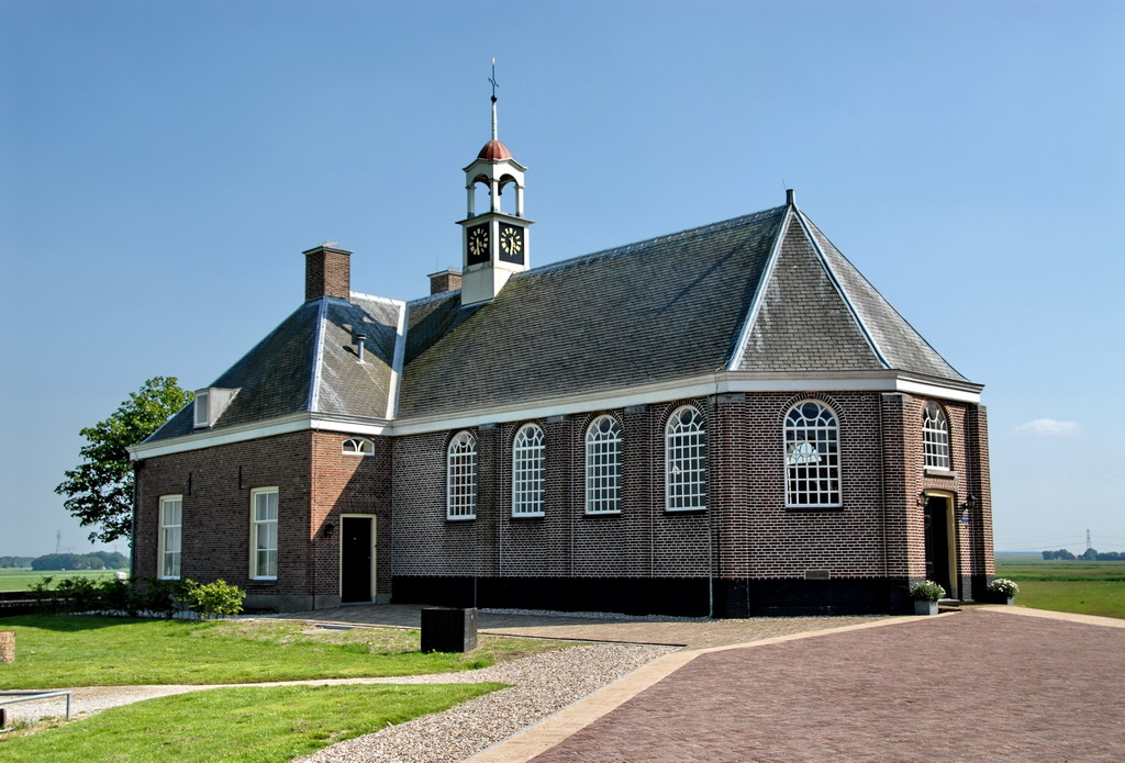 Waterstaatskerk. Church was build in 1834. De kerk werd in 1834 door Waterstaat gebouwd als vervanger van een vierkant kerkje dat tot die tijd op deze plaats stond. Dit vierkante gebouwtje was bij een storm in 1825 zo ernstig beschadigd, dat het moest worden afgebroken. Tot aan de ontruiming van Schokland (1859) heeft de kerk dienst gedaan. Daarna werd het gebruikt als opslagplaats en slaapplaats voor seizoensarbeiders. Na de drooglegging werd het onderdeel van Museum Schokland en kreeg het de status van Rijksmonument. In 1991 werd de kerk voorzien van het huidige interieur.